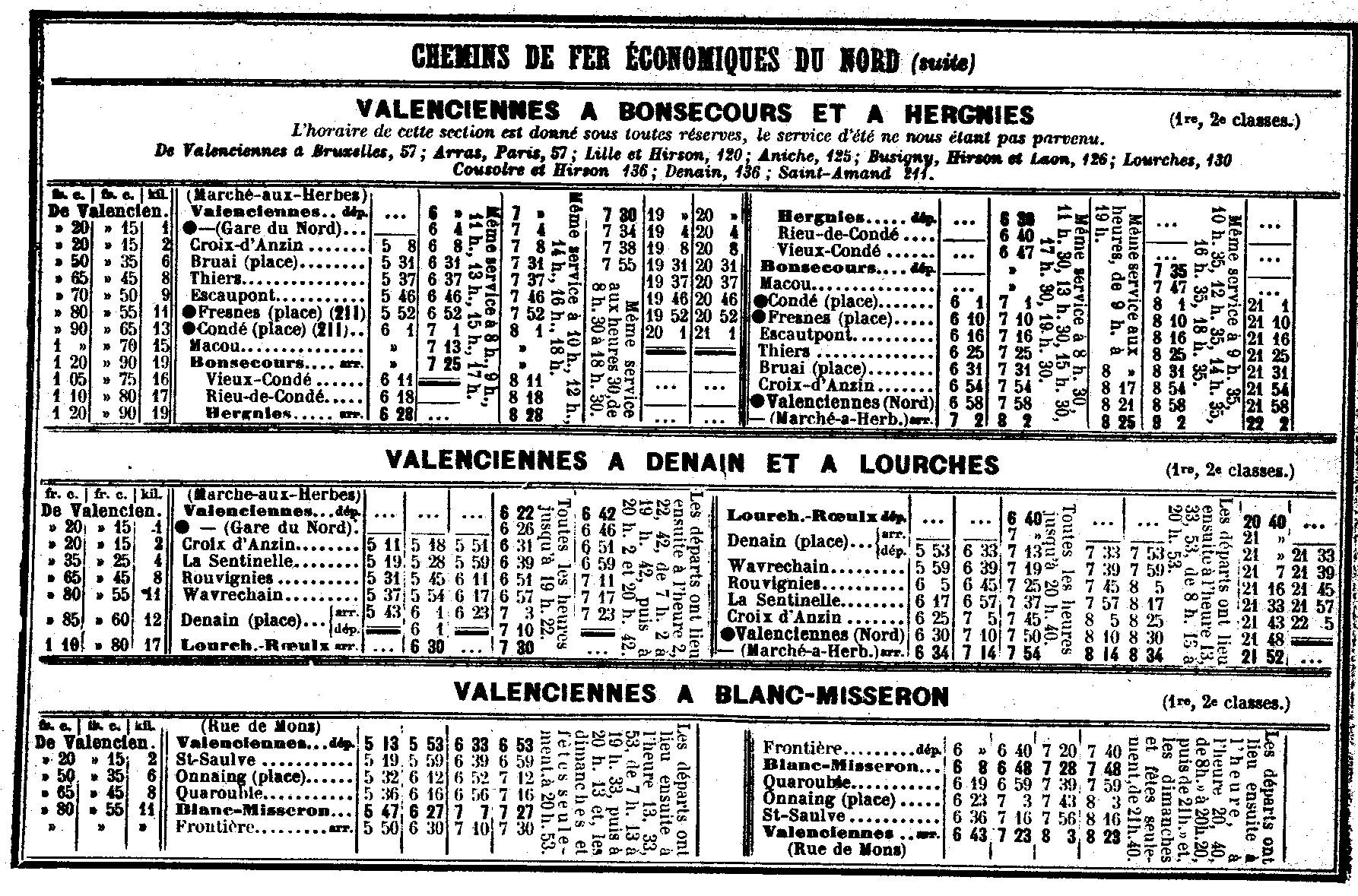 Livret horaire de la Compagnie des Chemins de fer économiques du Nord : réseau des tramways de ValenciennesLigne Valenciennes à Bonsecours ou HergniesLigne Valenciennes à Denain et LourchesLigne Valenciennes à Blanc-Misseron